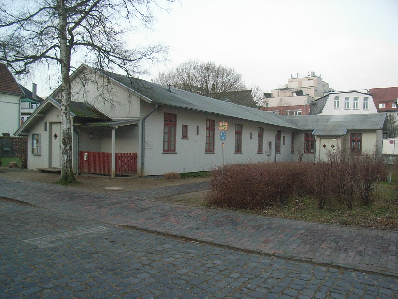 Ehemalige Isolationsbaracke des Peter-Friedrich-Ludwigs-Hospital in Oldenburg (Oldb.)